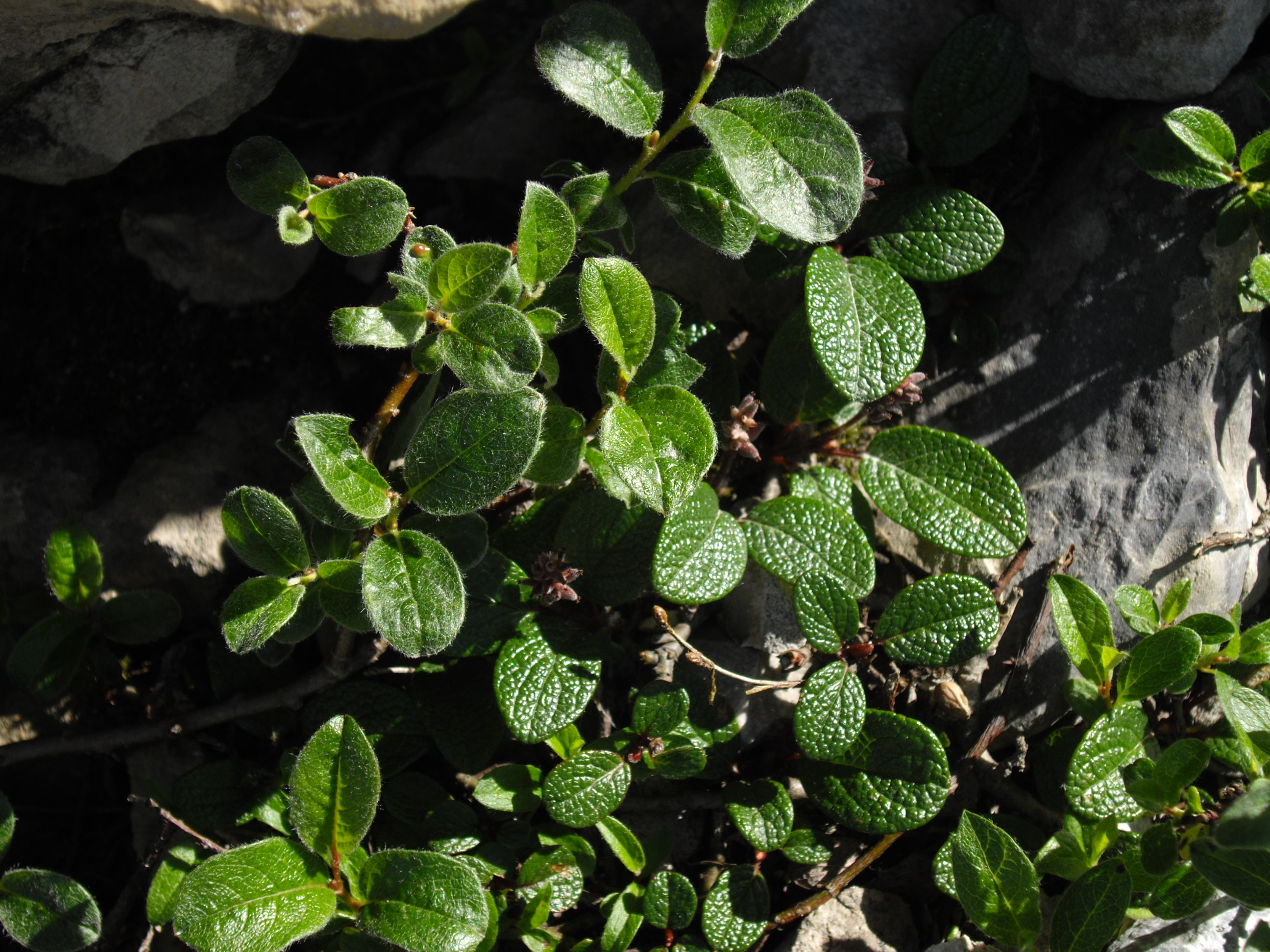 Salix pyrenaica female plant